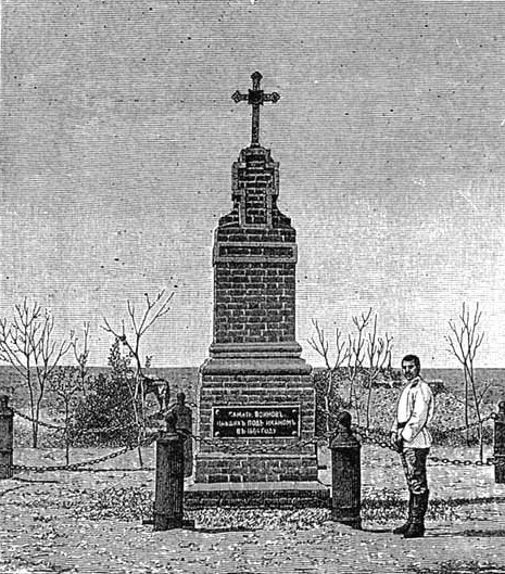 Памятник, поставленный на братской могиле на поле битвы под Иканом. Уничтожен большевистскими варварами после октябрьского переворота 1917 года.